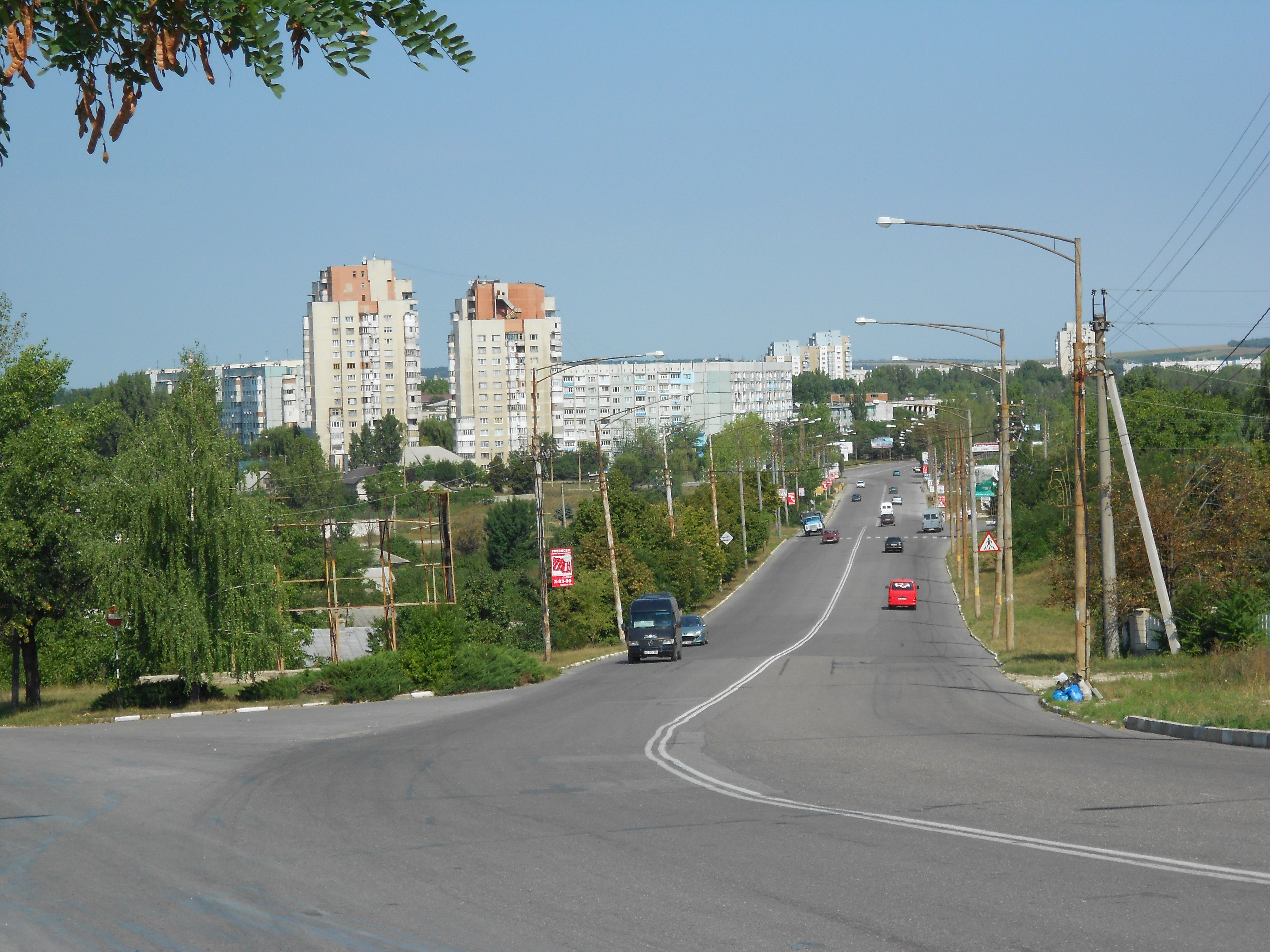 Strada Gagarin din Bălți